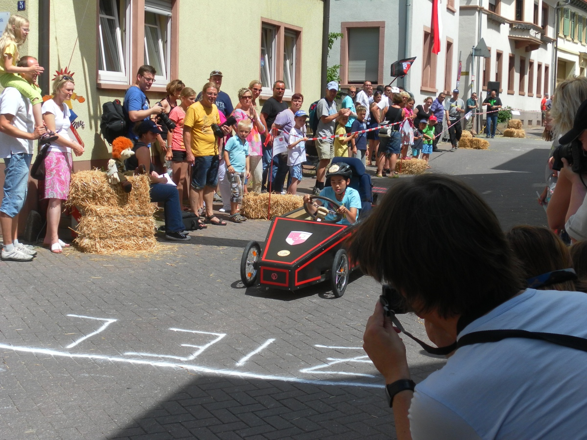 Seifenkistenrennen in Hirschberg Leutershausen